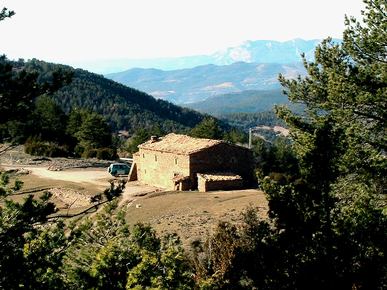 La Masia de l'Hostal del Vent al peu de la carretera Solsona-Sant Llorenç